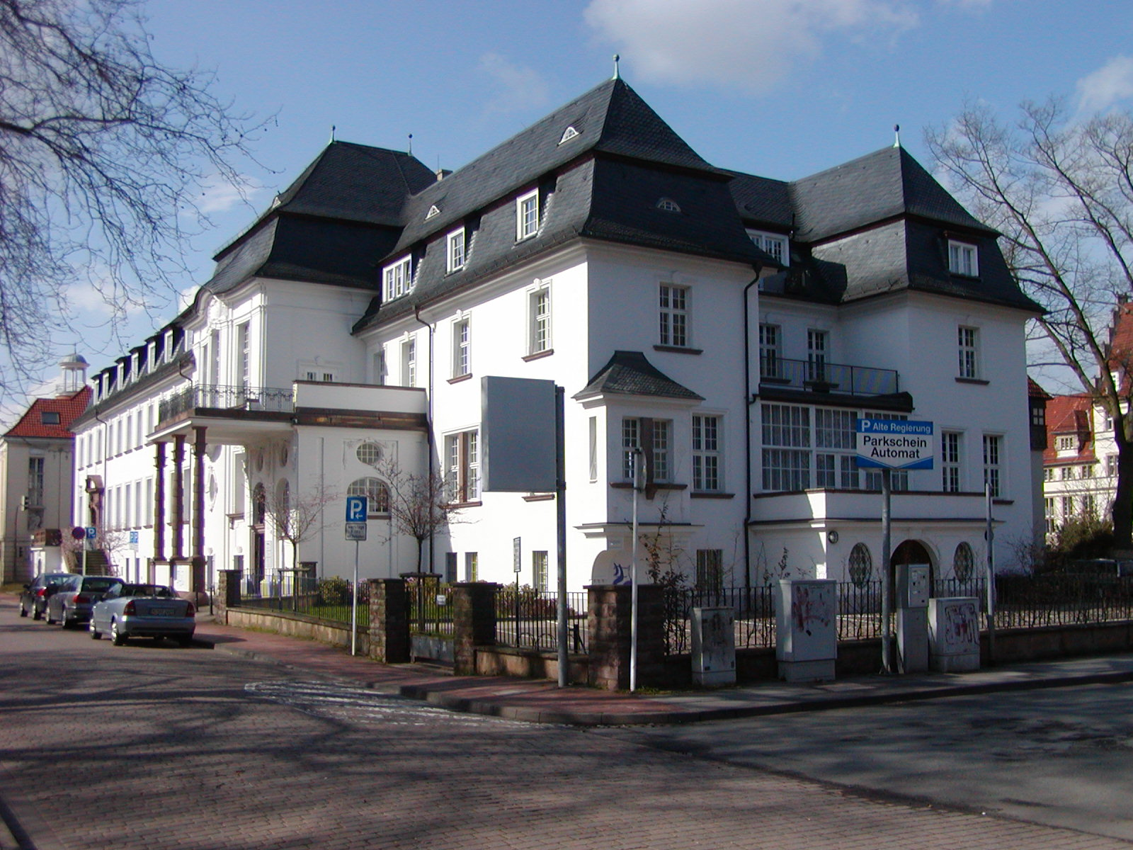 Altes Kreishaus des Kreises Minden in Minden, Nordrhein-Westfalen